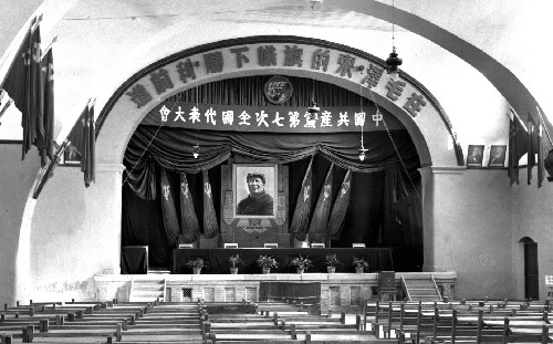 中国共产党第七次全国代表大会会场